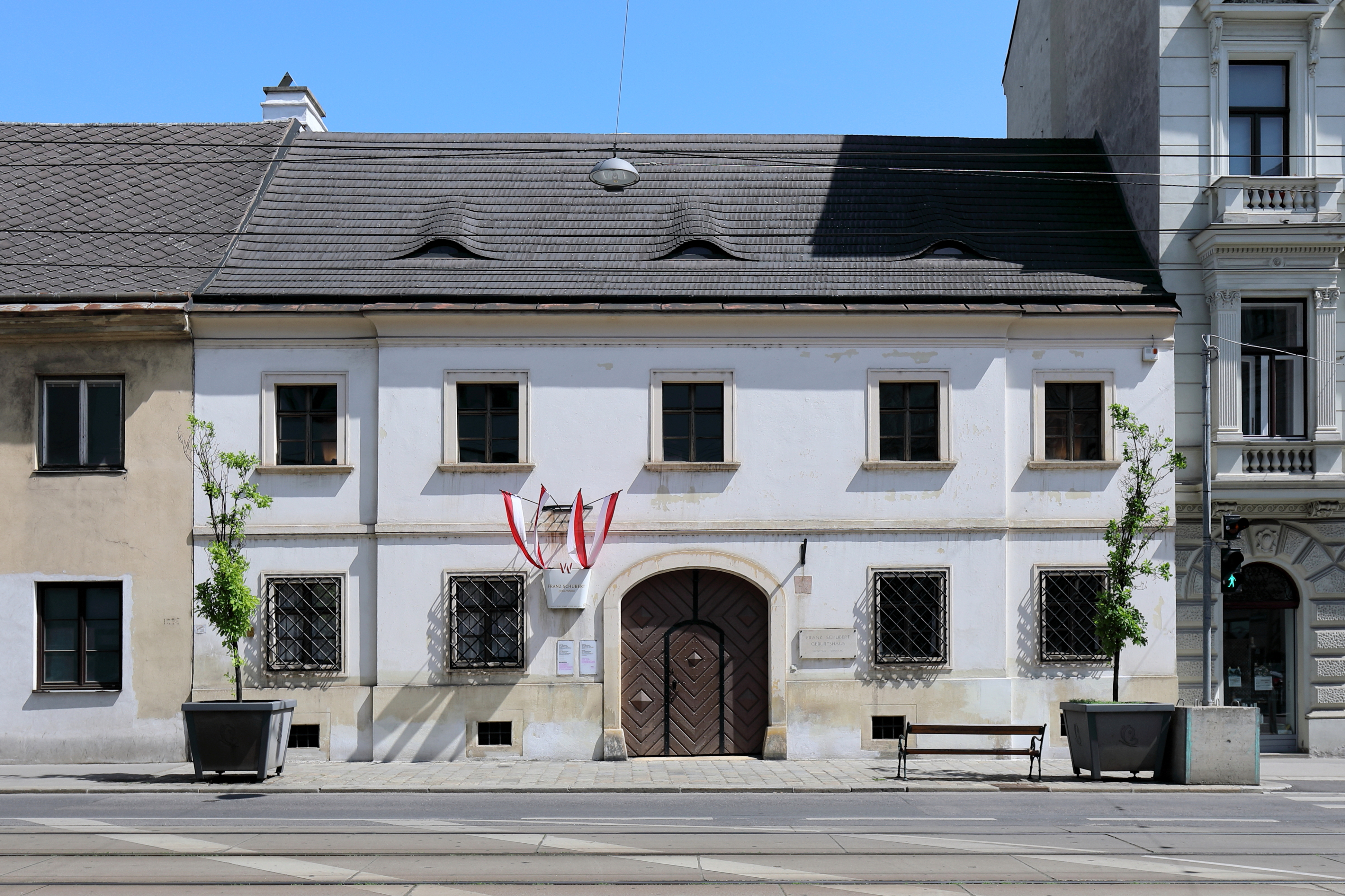 Das Geburtshaus des Komponisten Franz Schubert (31. Jänner 1797 geboren) am Himmelpfortgrund, heute Nußdorfer Straße 54 im 9. Wiener Gemeindebezirk Alsergrund. 1908 beschloss der Gemeinderat das Haus anzukaufen und darin ein Schubertmuseum einzurichten, das am 18. Juni 1912 eröffnet wurde und bis heute besteht.